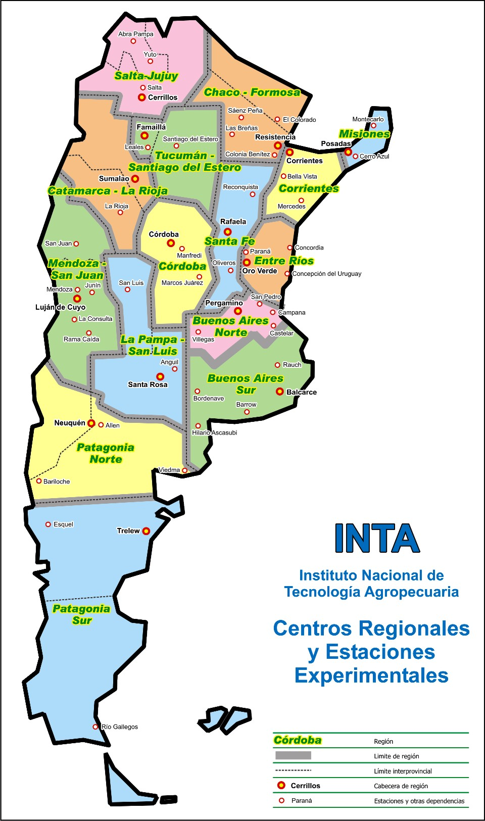 Regiones y Estaciones Experimentales del Instituto Nacional de Tecnología Agropecuaria (INTA) de Argentina.